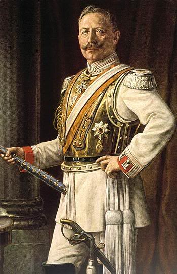 Ritratto del Kaiser Guglielmo II di Germania (1859-1941)